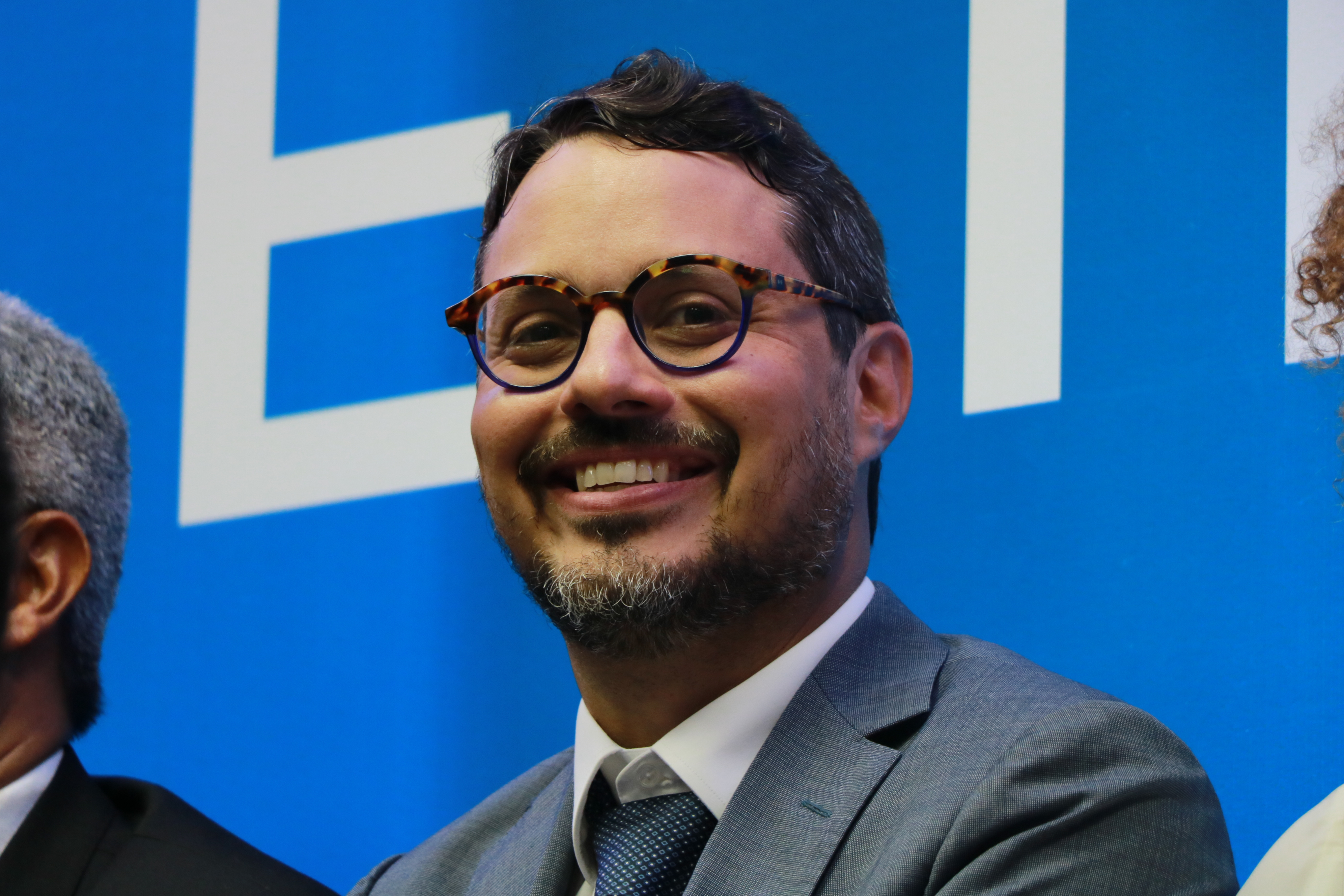 Secretário de Turismo